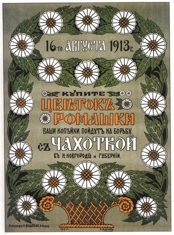 Благотворительный плакат. Россия, 1913 год День белого цветка — день помощи больным туберкулезом.